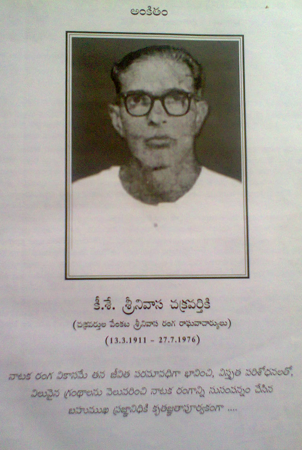 నాటక విజ్ఞాన సర్వస్వం